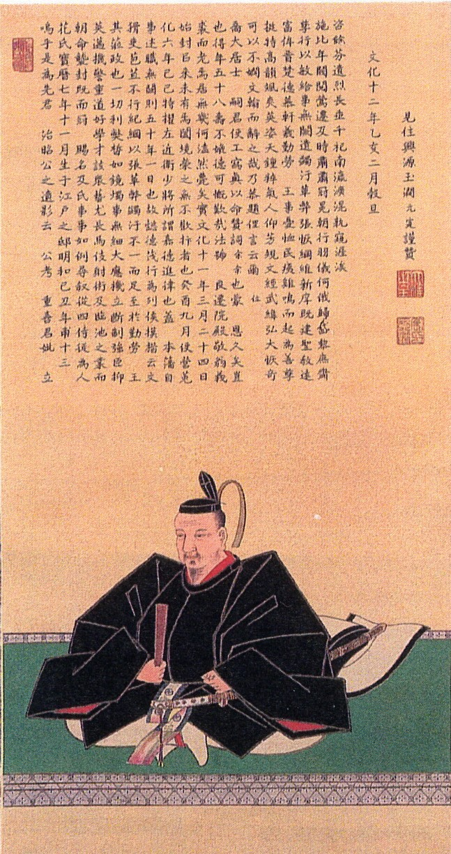 蜂須賀治昭の肖像。